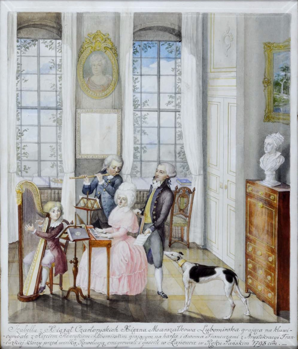 Scena z koncertującym triem. Księżna Izabela Lubomirska gra na klawikordzie, jej wychowanek Henryk Lubomirski na harfie.